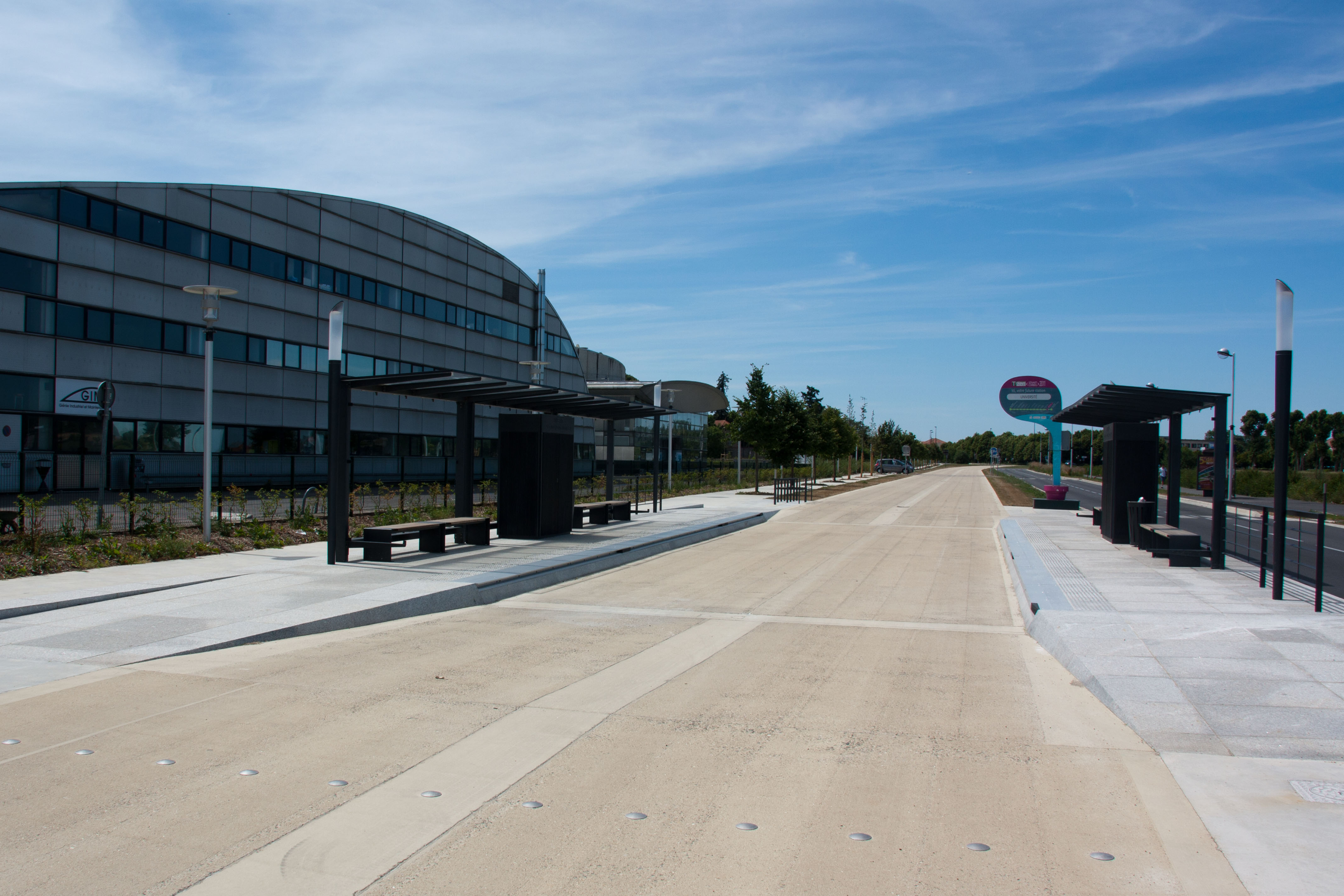 T-ZEN Ligne 1 - station de la ligne - Département de l'Essonne et de Seine-et-Marne